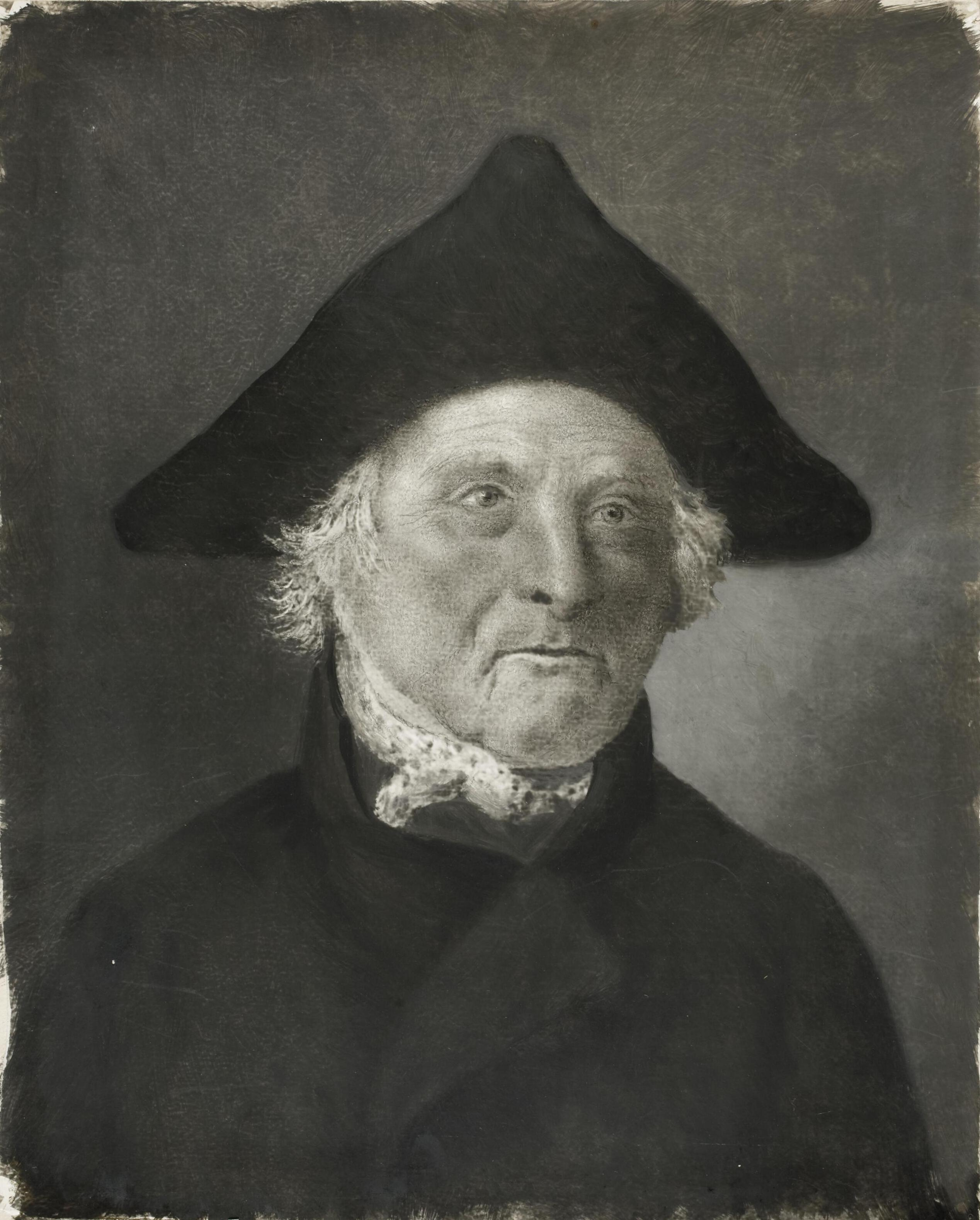 Hendrik Jan Averink van 1812 tot 1843 maire en burgemeester van Delden